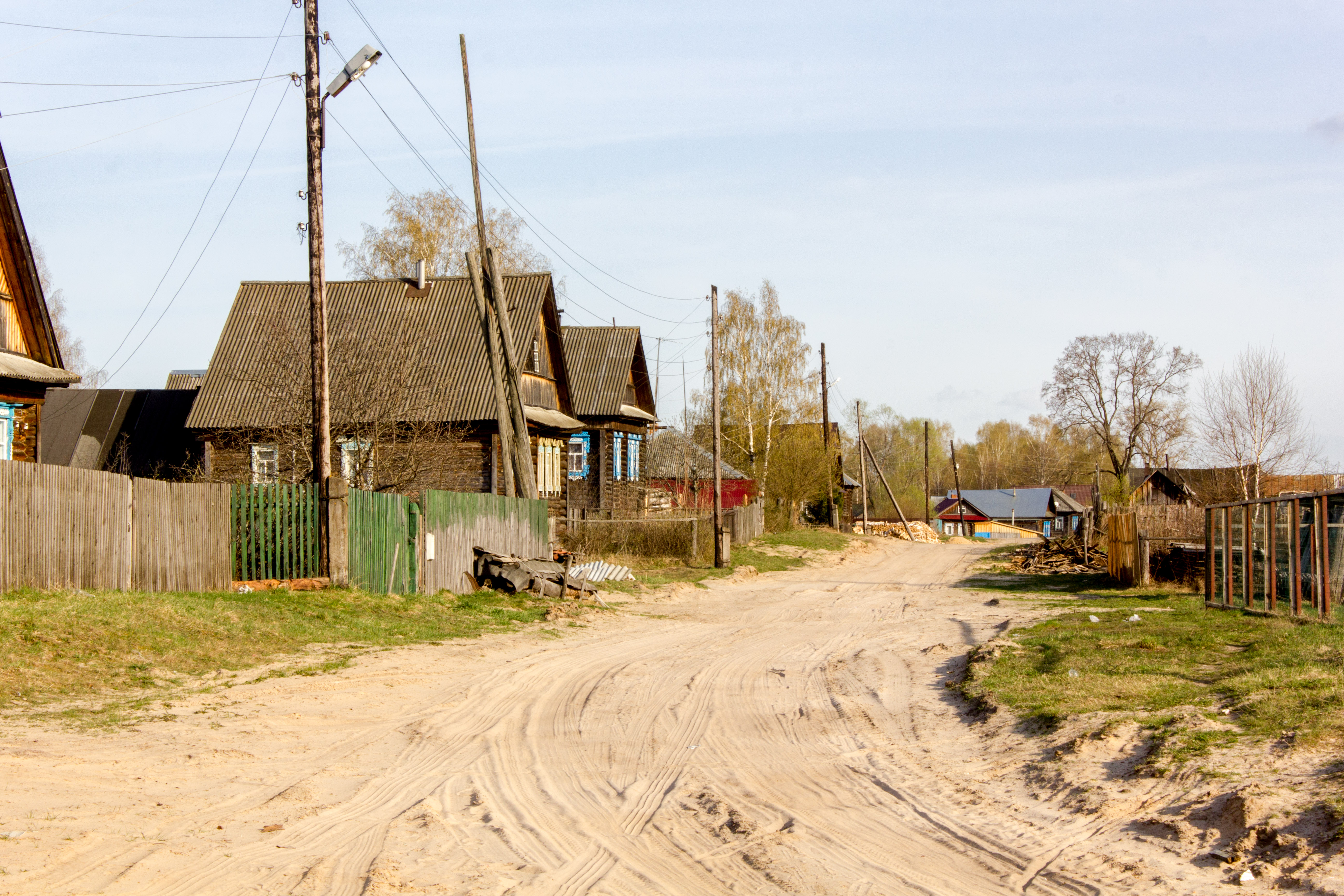 Береговая улица